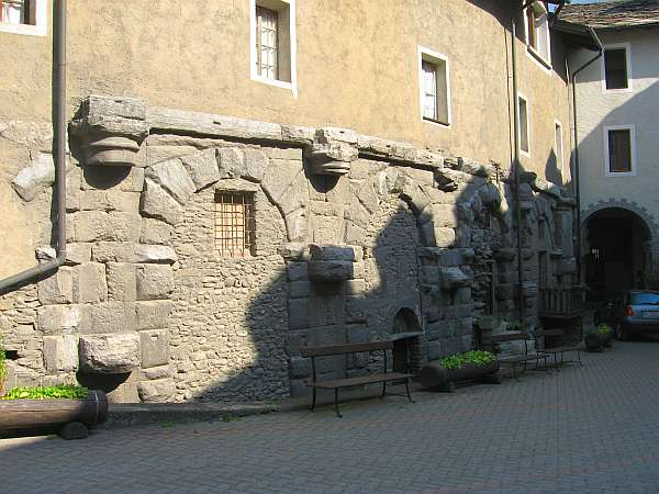 I resti delle semicolonne che ornavano la facciata dell'anfiteatro romano sono ancora presenti nella costruzione del convento